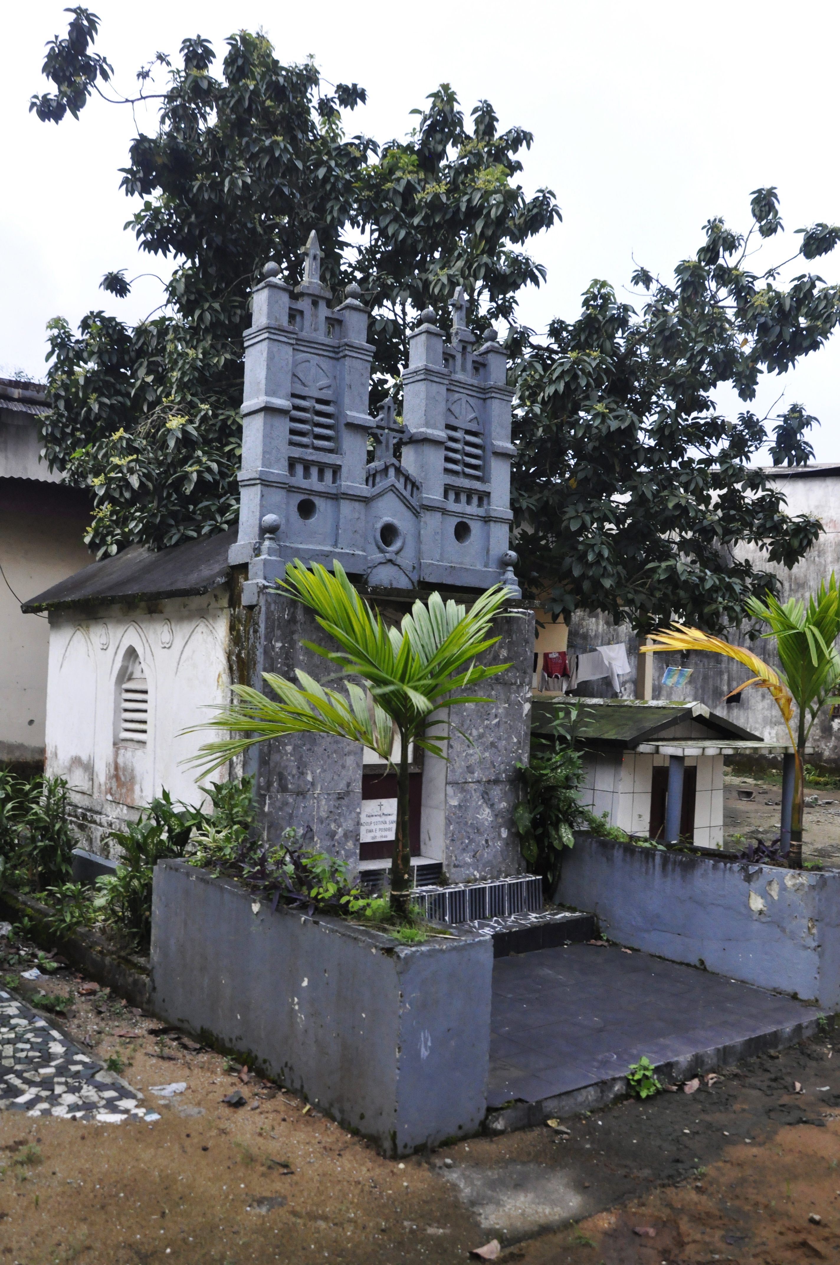 Tombeau du Pasteur Adolf Lotin'a Same